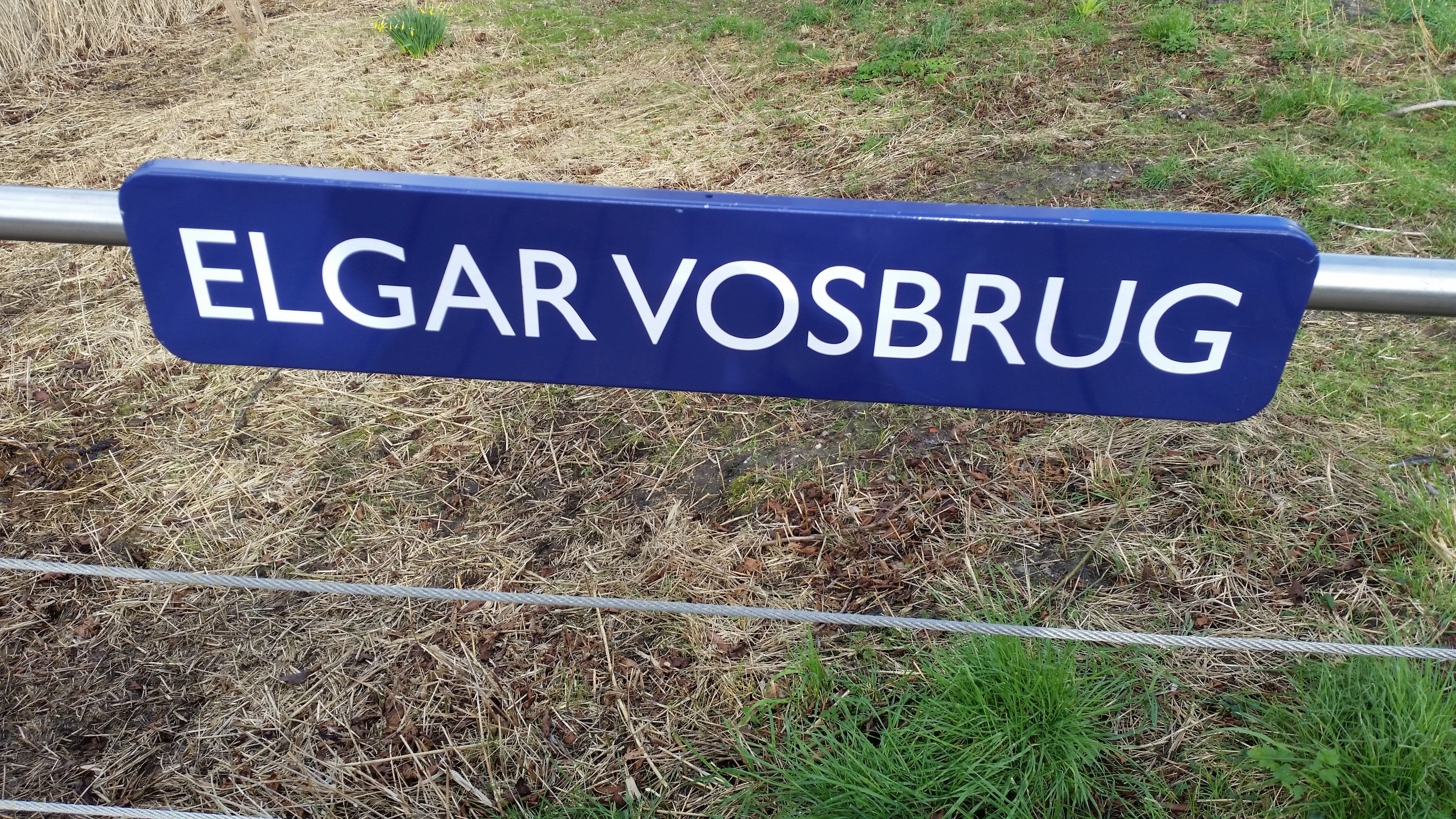 Elgar Vosbrug tussen Park Frankendael en Kamerlingh Onneslaan, Amsterdam (maart 2020)